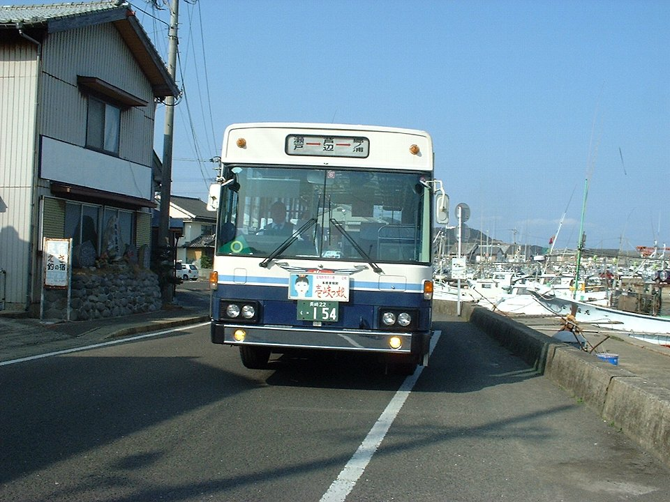 勝本バス停に接近するja:壱岐交通バス